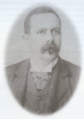 Imagem do José Paulino Nogueira (1853-1915).